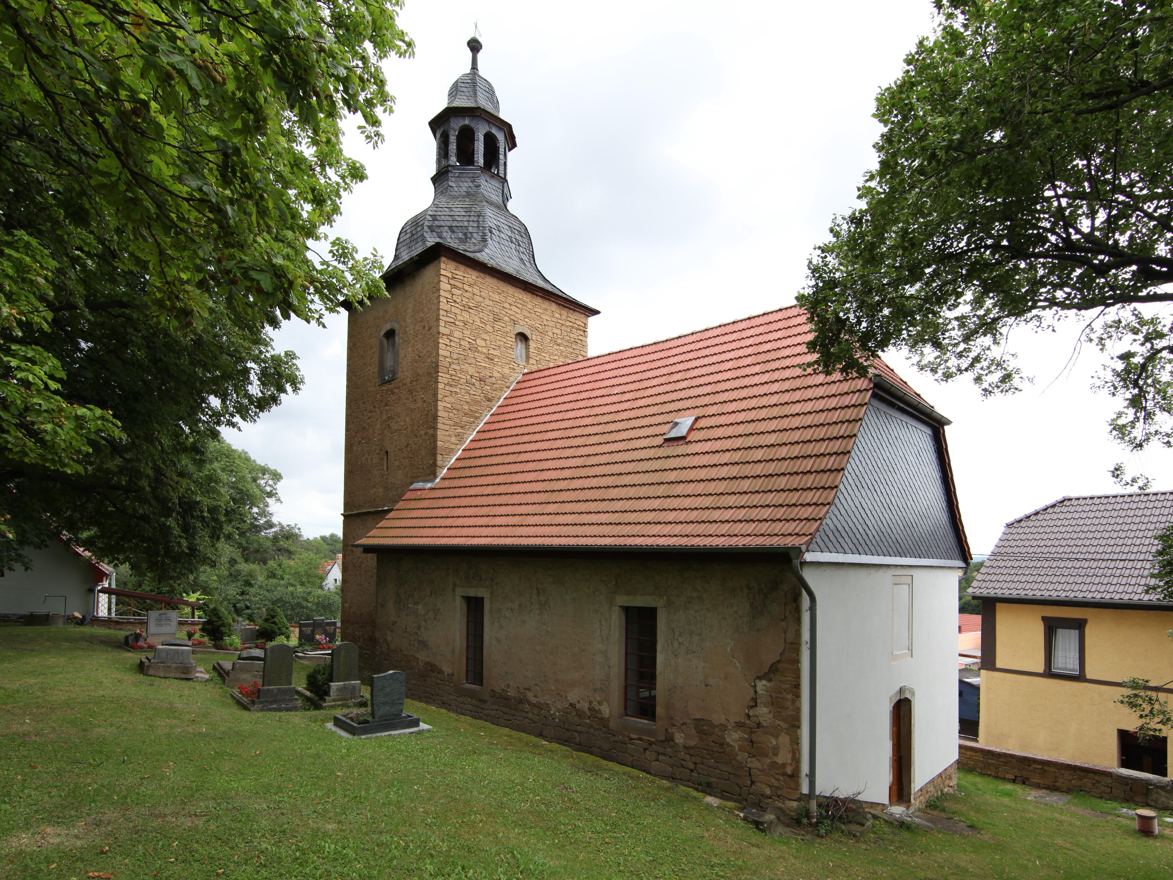 Evangelische Kirche in Haindorf im Landkreis Weimarer Land, Thüringen